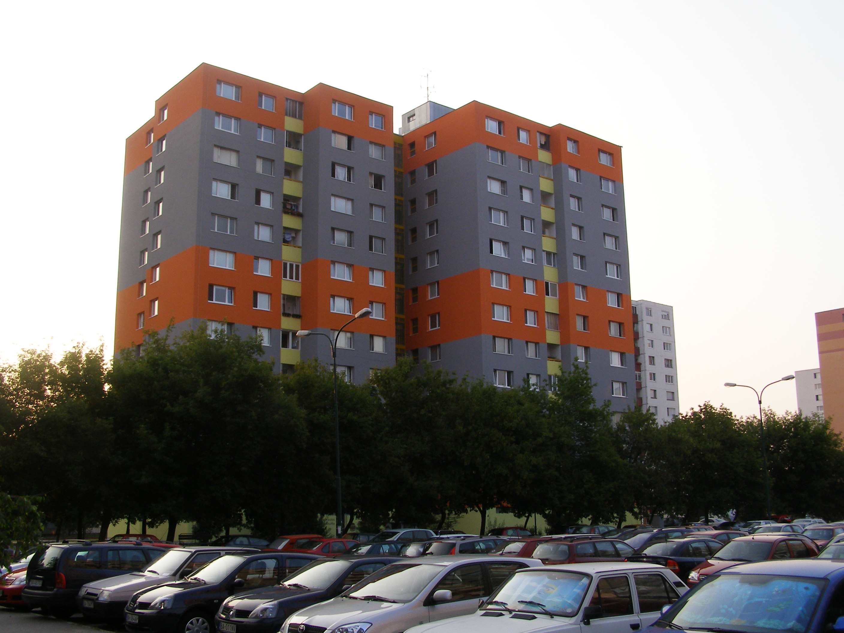 Hrobákova street, Petržalka, Bratislava